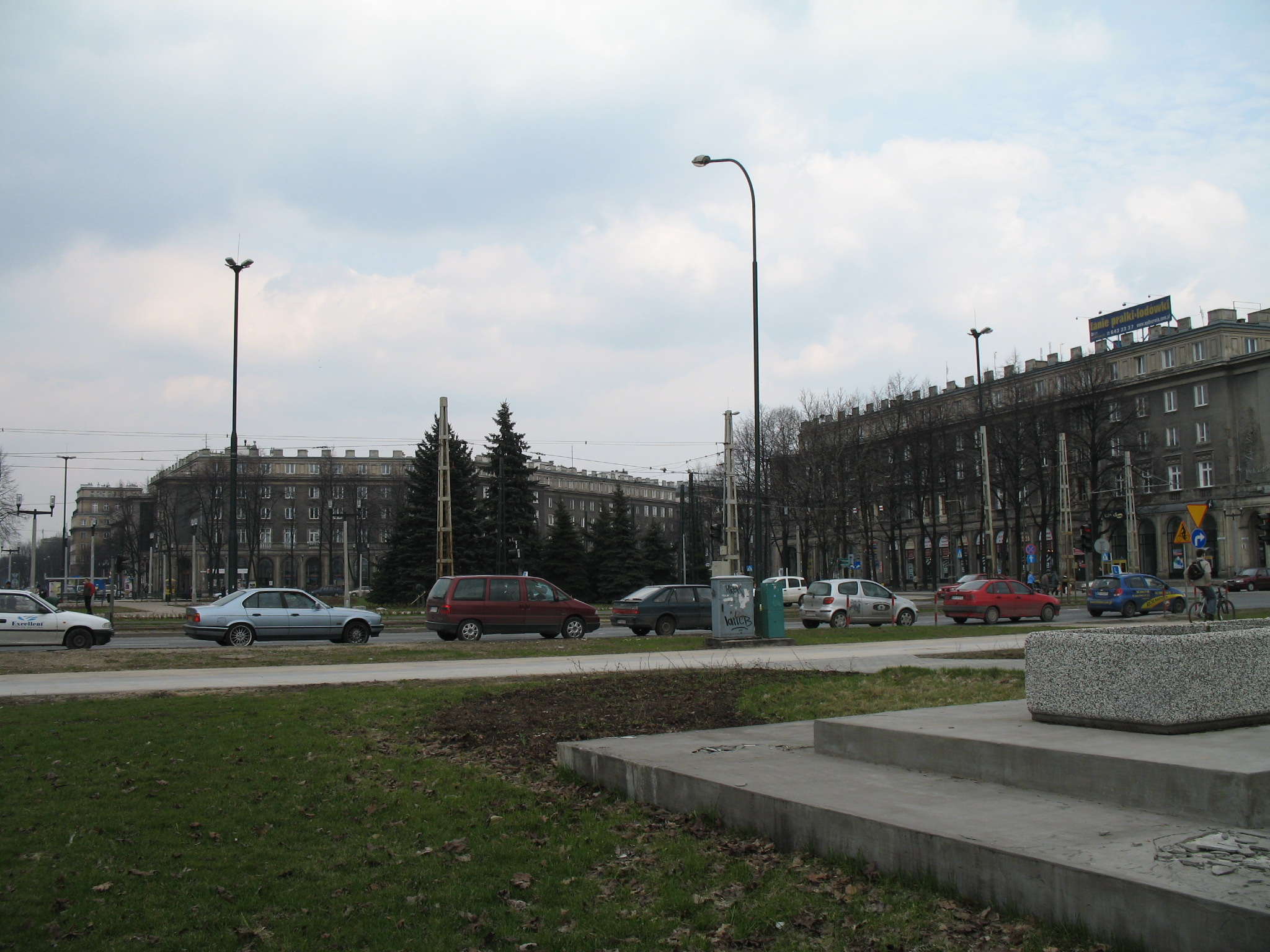 Zdjęcie Centrum A autorstwa Wikipedysta Wiktorp.